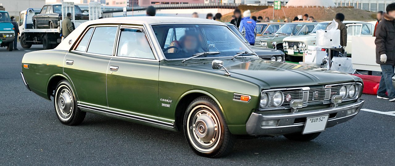 Nissan Cedric 2000 Deluxe ( 230 )